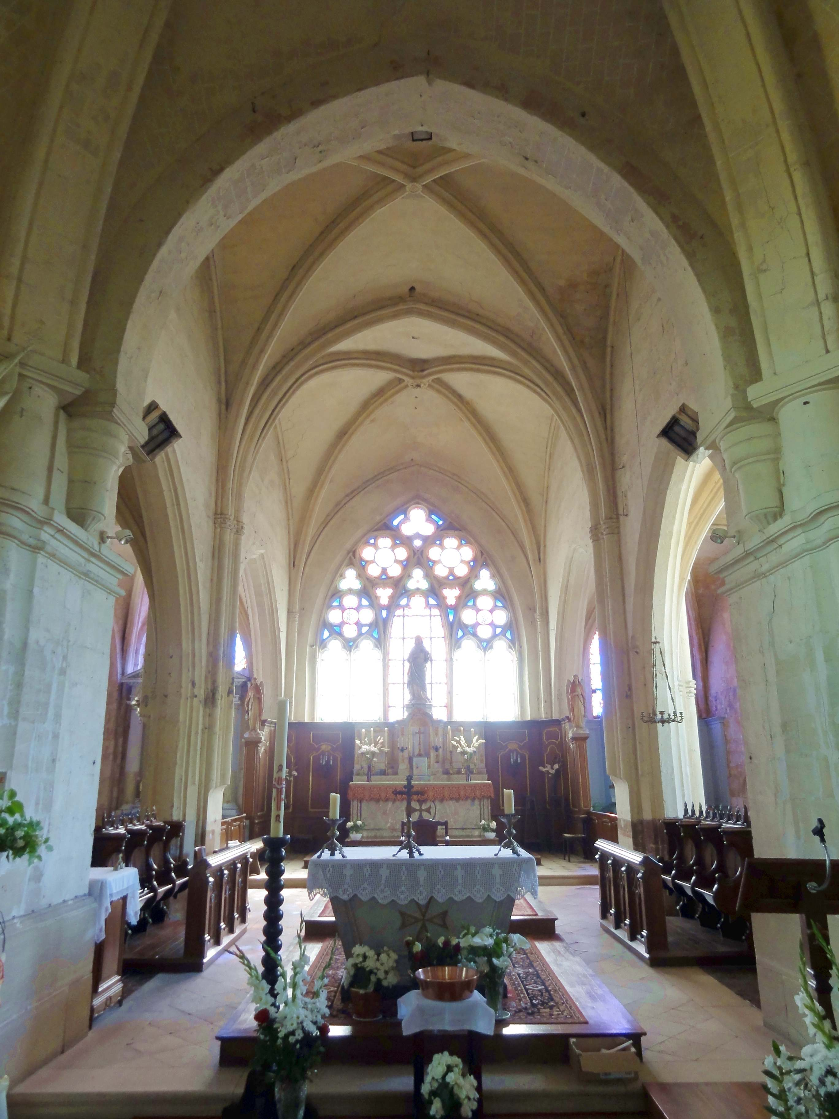 Intérieur de l'église Saint-Vaast de Nointel (voir titre).